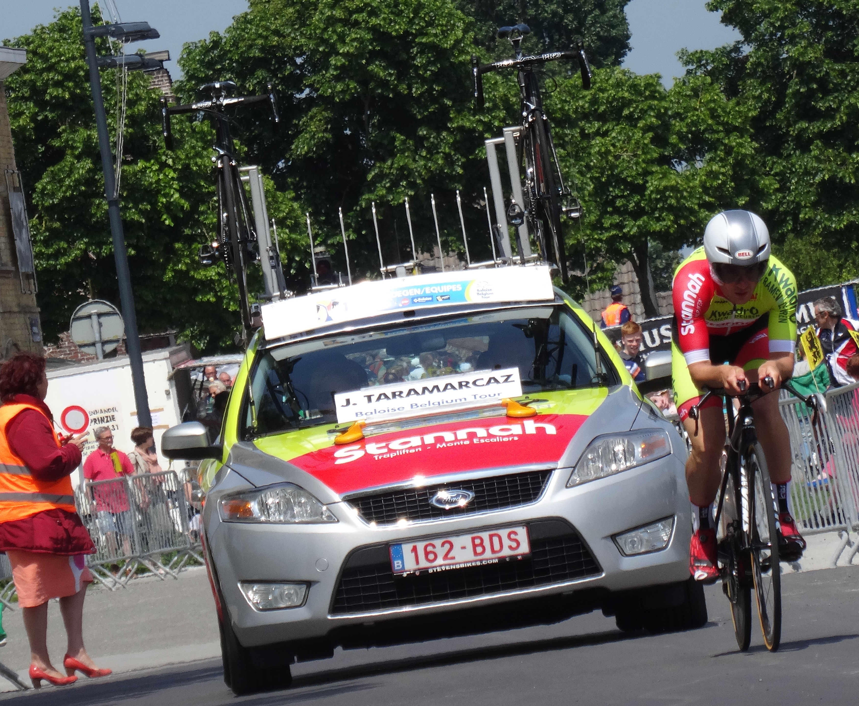 Reportage photographique réalisé le vendredi 30 mai à l'occasion du contre-la-montre individuel de la troisième étape du Tour de Belgique 2014 à Dixmude, Belgique.